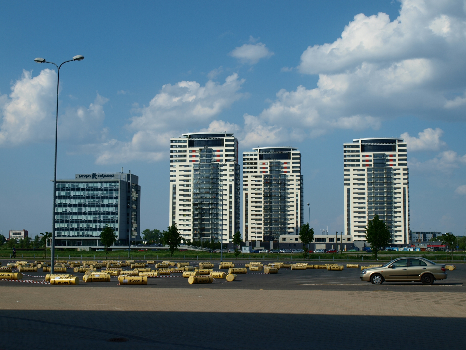 skanstes masivi